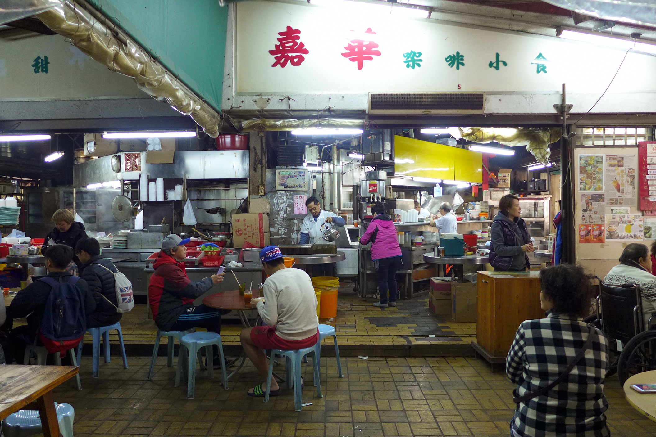 Kwong Fok Estate Daipai Dong Interior